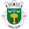 brasao da usseira